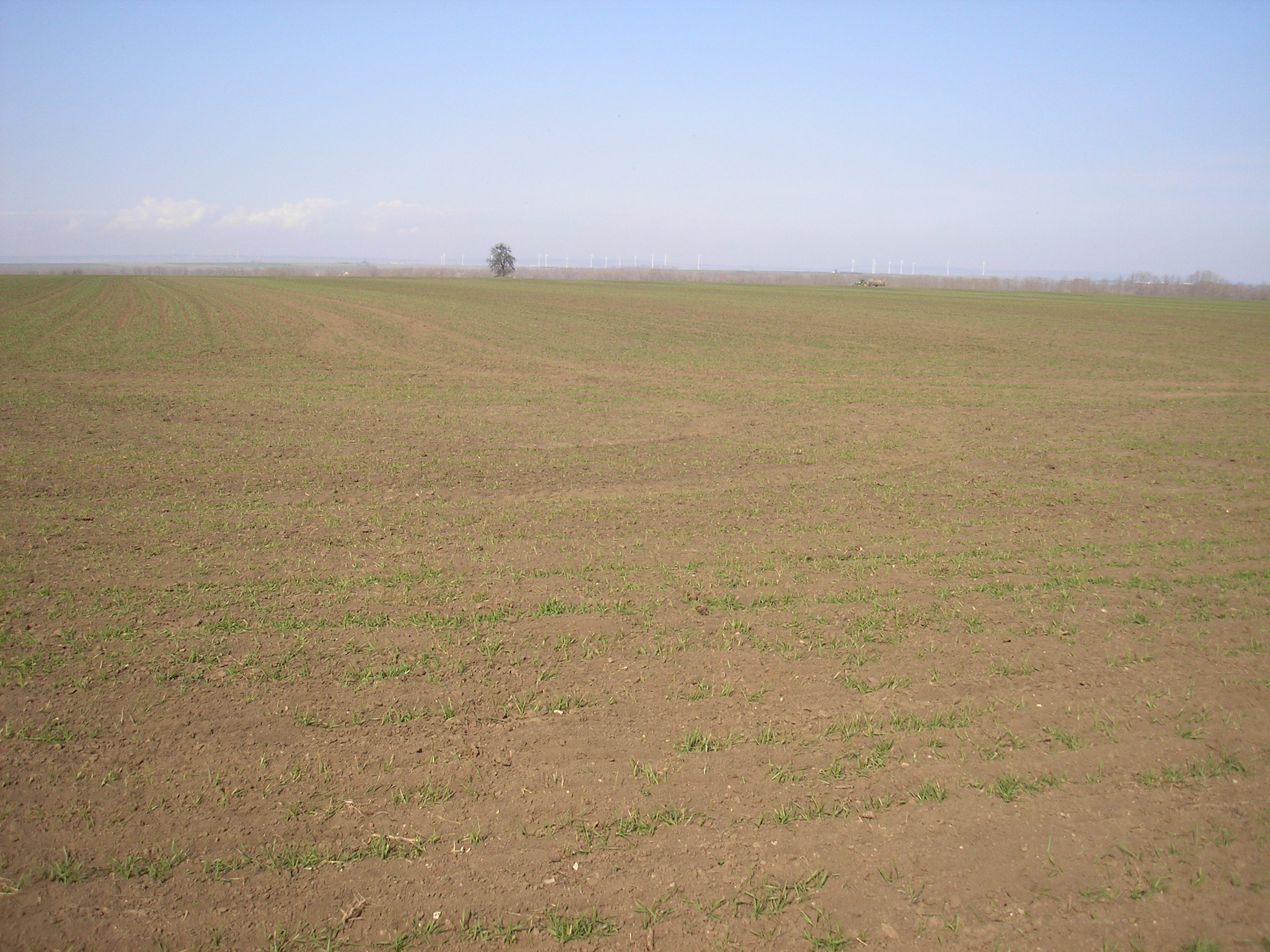 Ackerbau im Thüringer Becken bei Herbsleben (Thüringen).